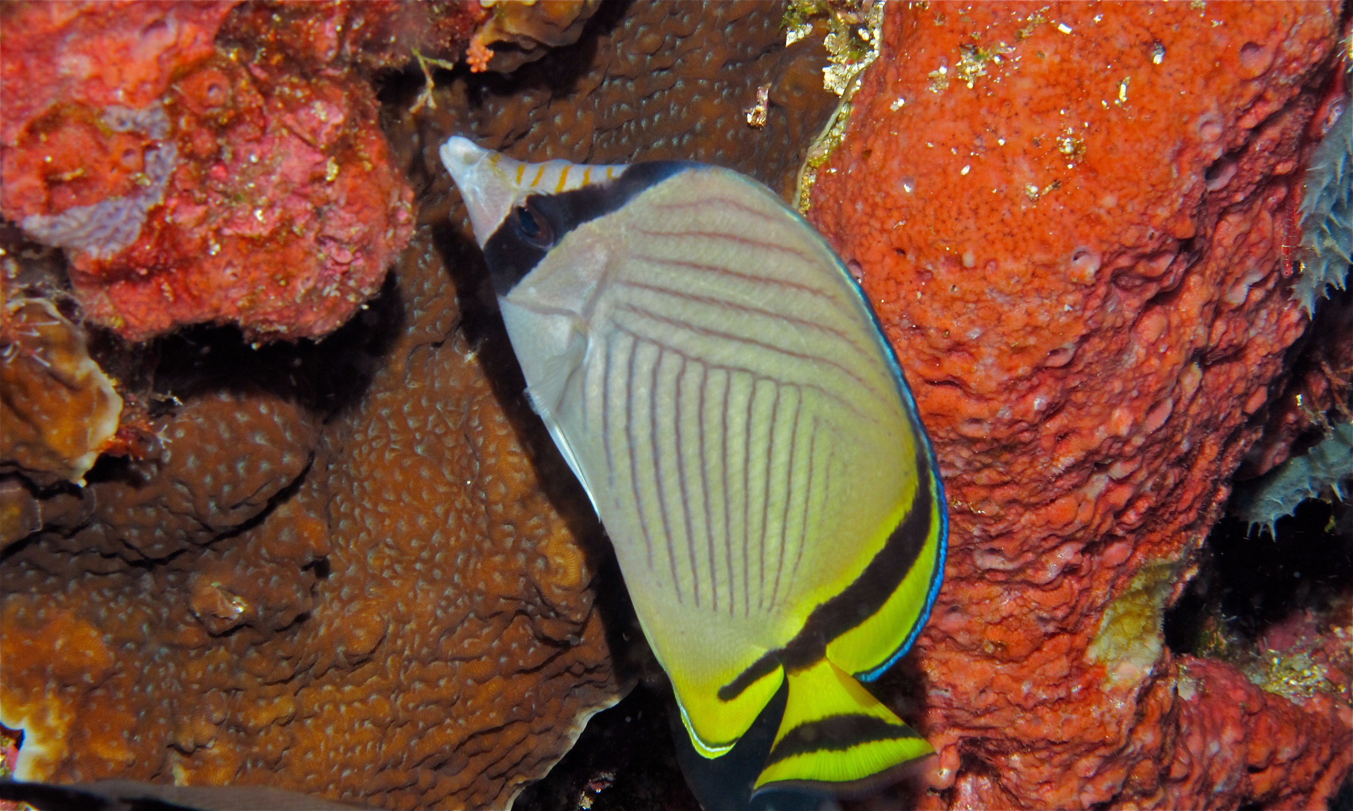 Mandoline, Bunaken Island, Sulawesi, INDONESIA